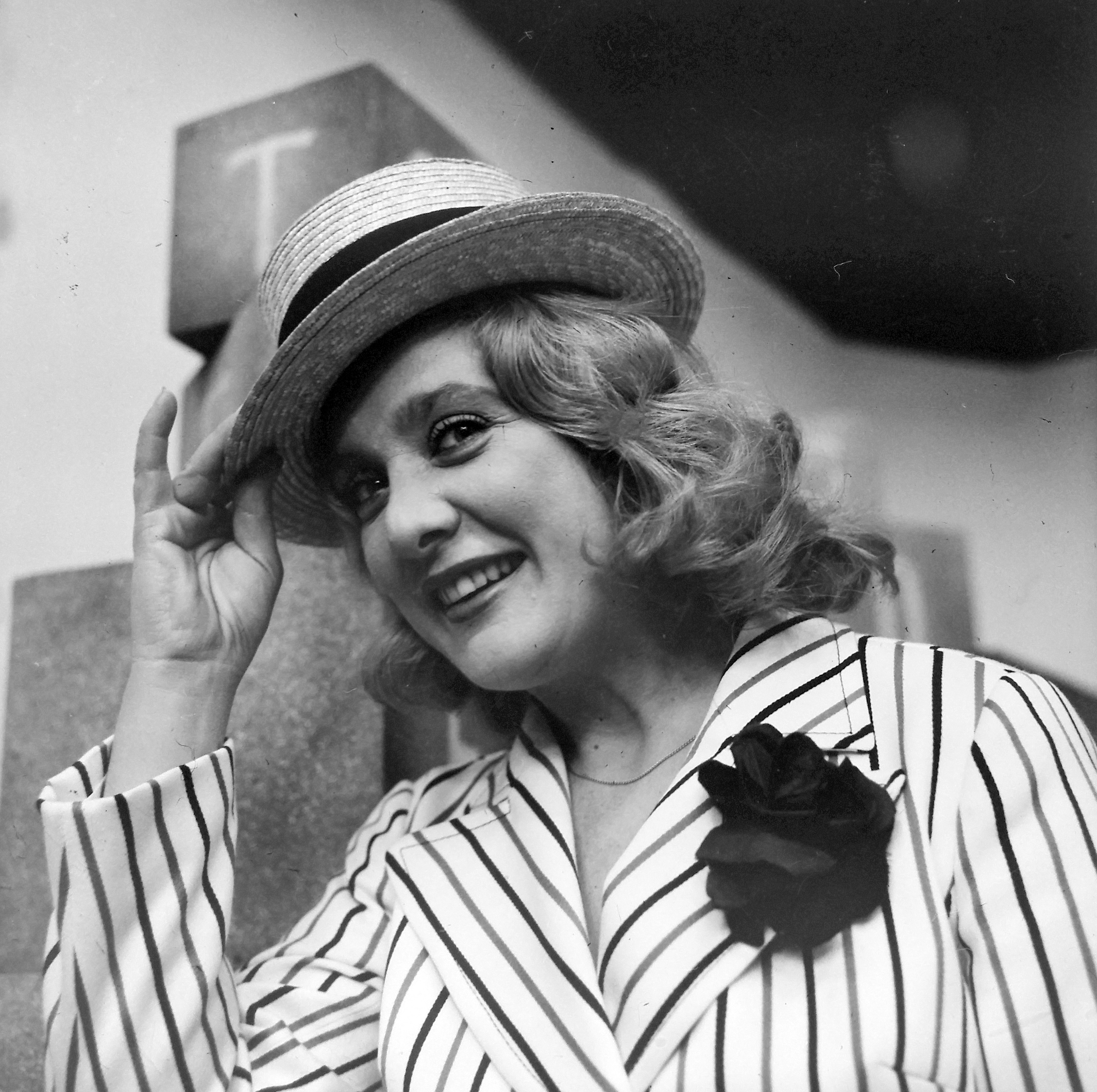 Lola Novaković u seriji "Na slovo, na slovo" 1975. godine.foto Stevan Kragujević (po odobrenju kćerke Tanje Kragujević)